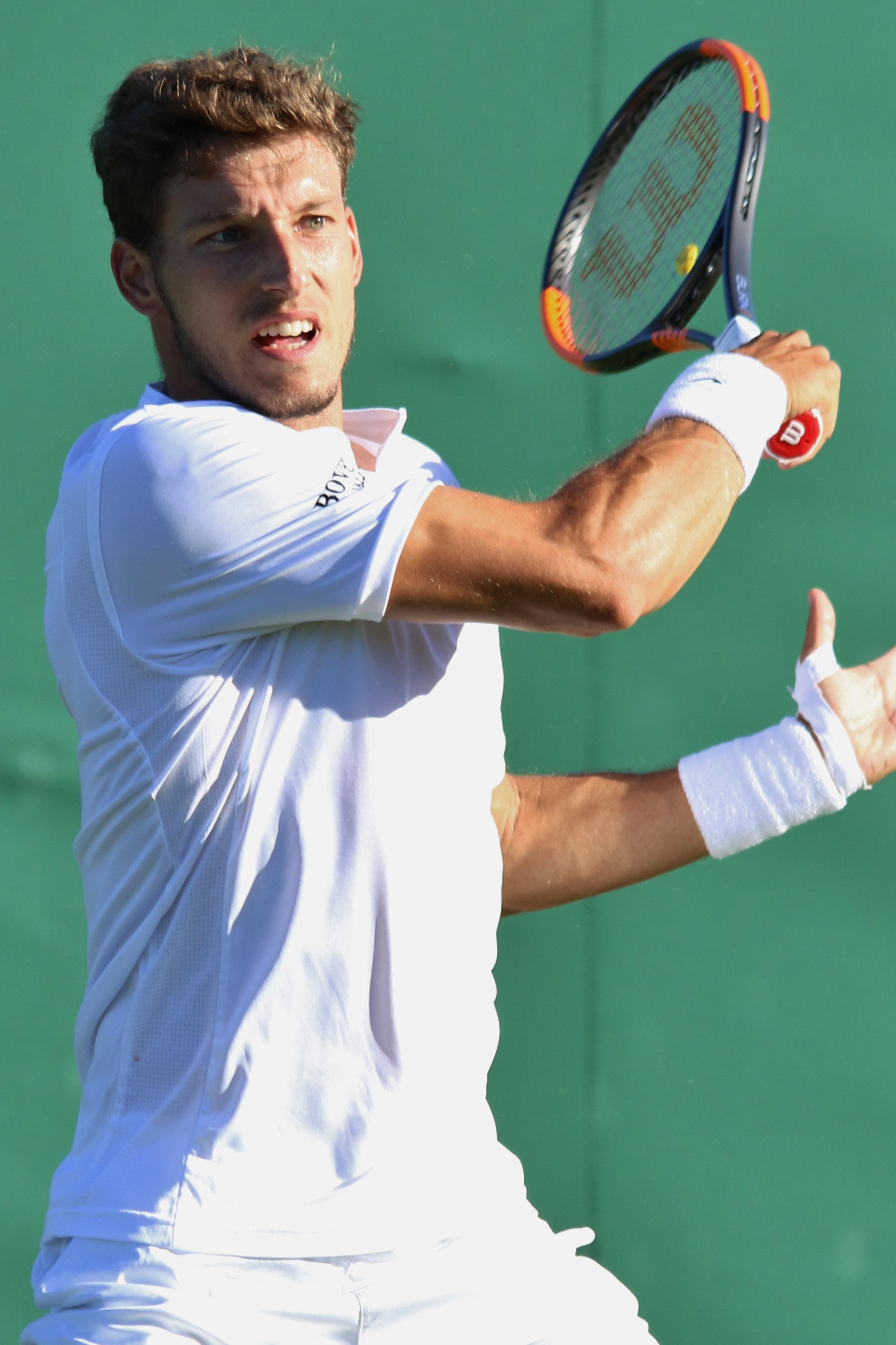 Carreno Busta WM18 (20)